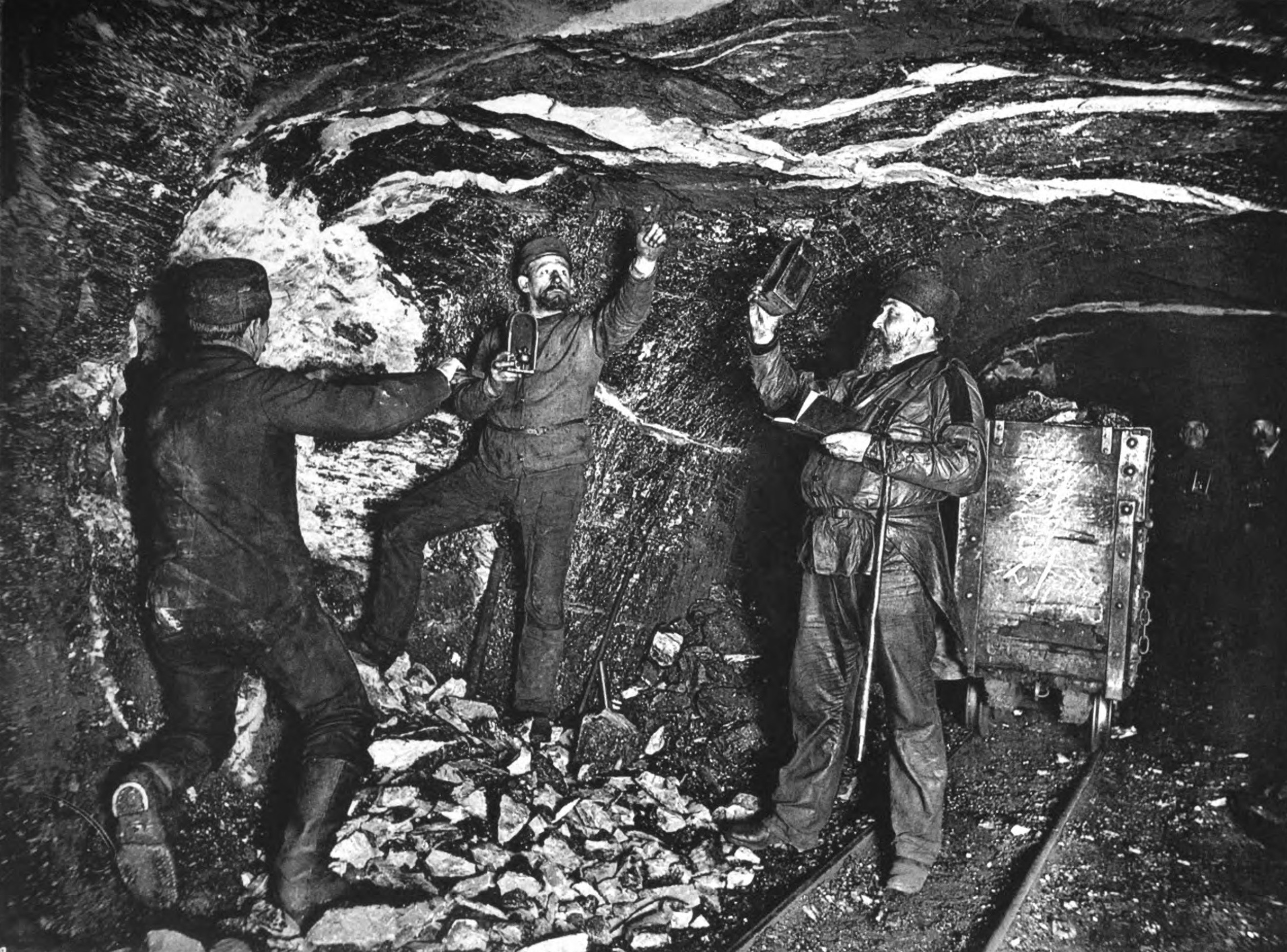 Gedingstellung